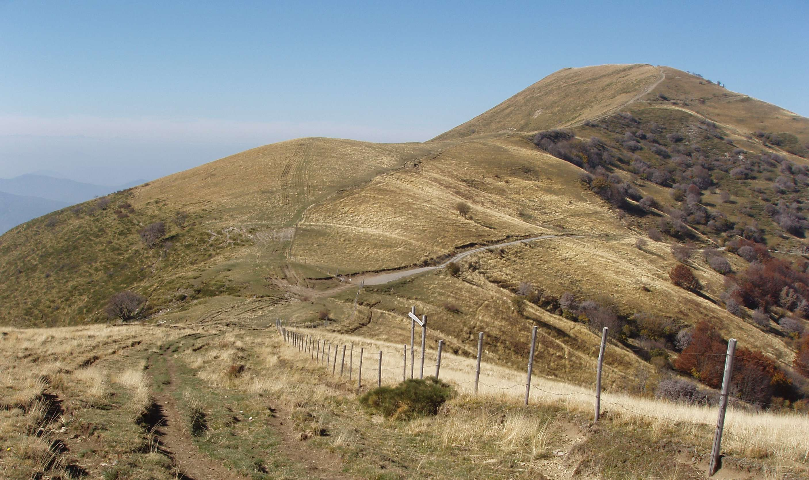 Monte Ebro e Bocca di Crenna dal Monte Prenardo